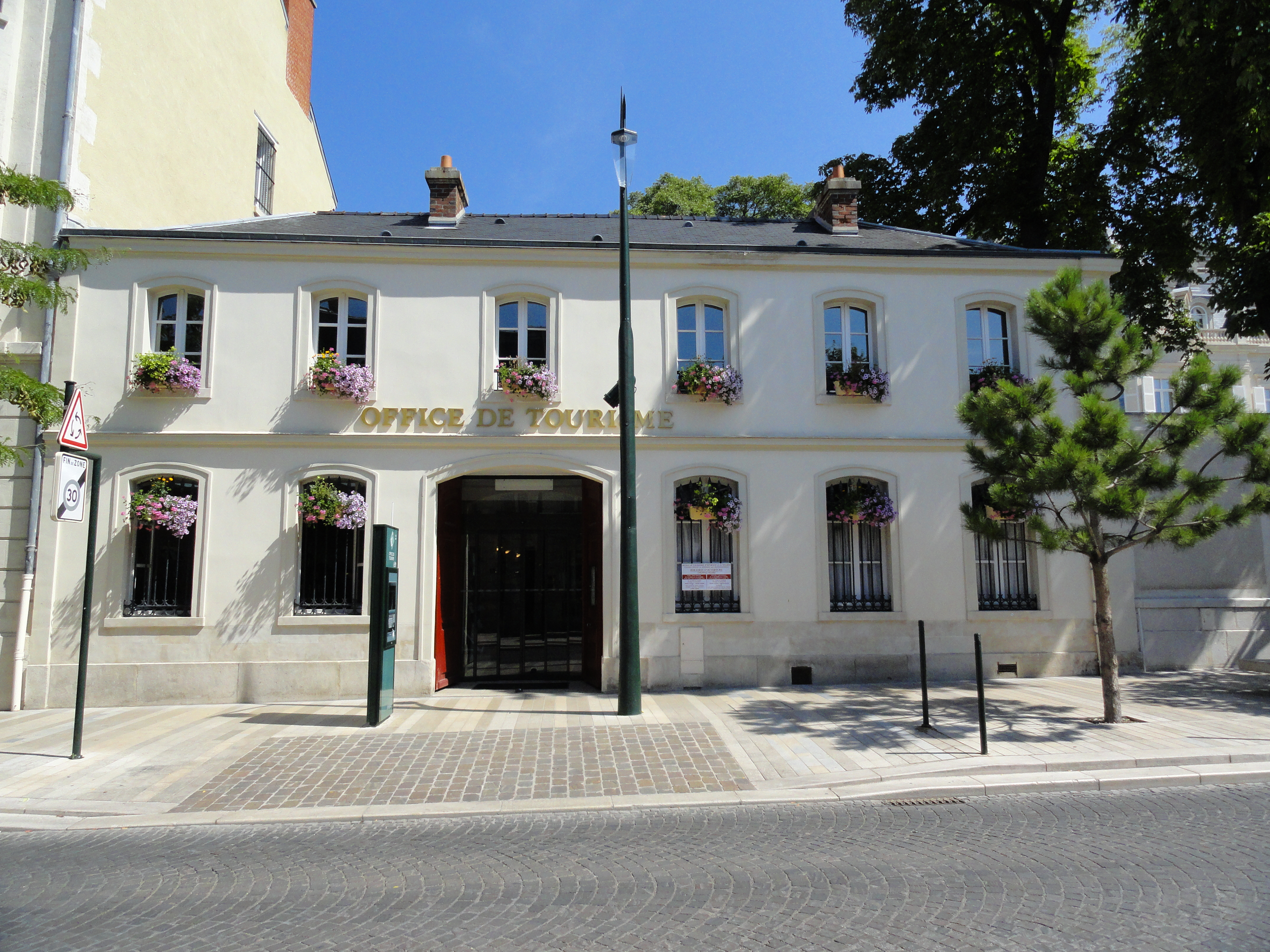 Office de tourisme d'Épernay